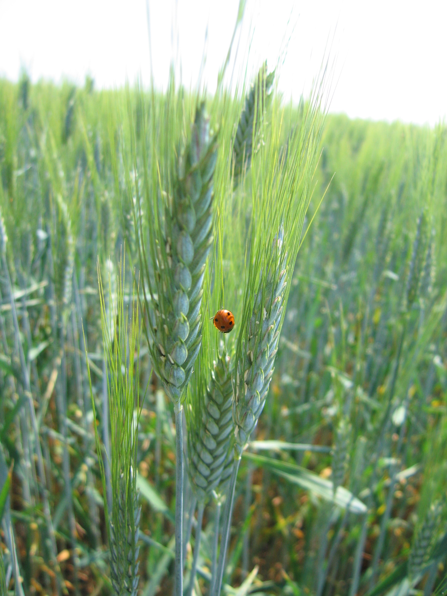 Triticum durum, pšenica tvrdá je charakteristická svojimi dlhými "fúzami" na klase